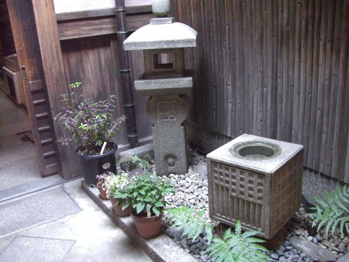 四条京町家の玄関庭。